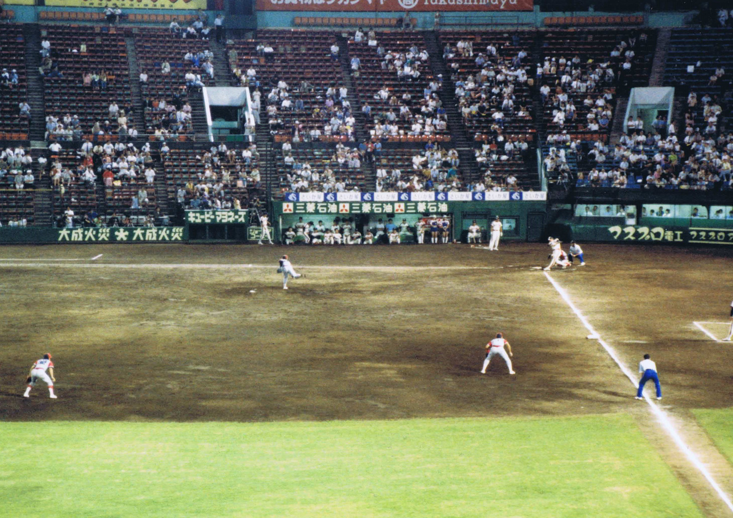 レフト側スタンドから見た川崎球場のグラウンド、一塁側ベンチ付近には「マスプロアンテナ」の広告も見える